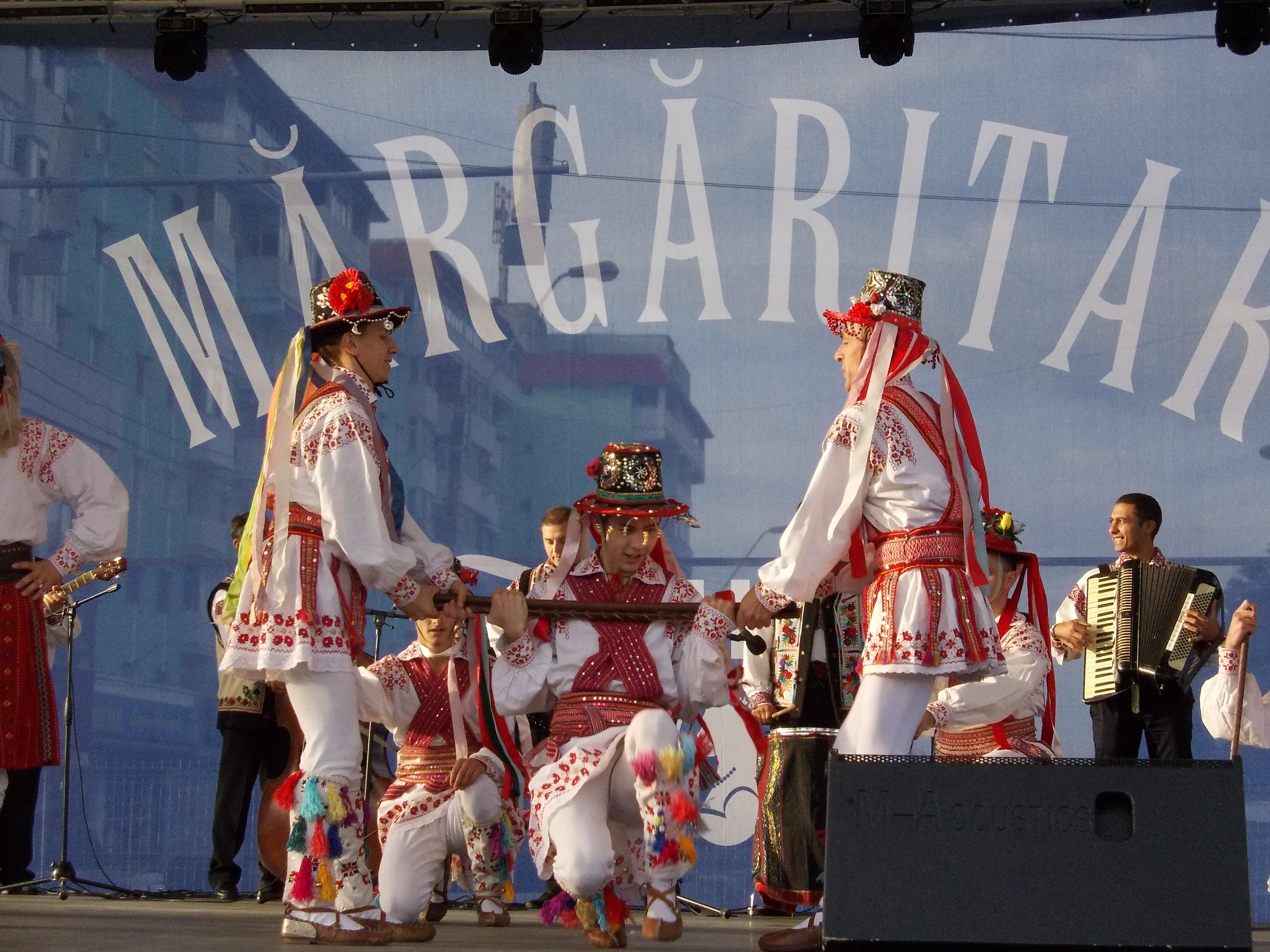 căluşari la Roman